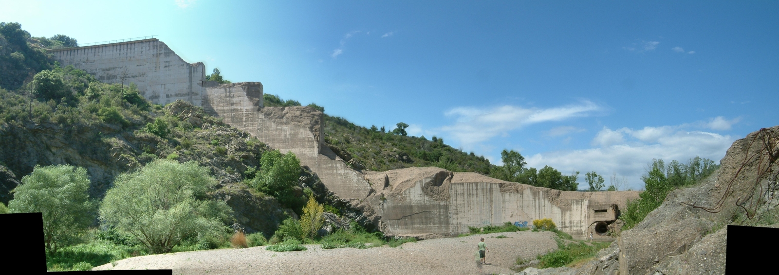 Barrage de Malpasset Fréjus France destroyed on December 2, 1959